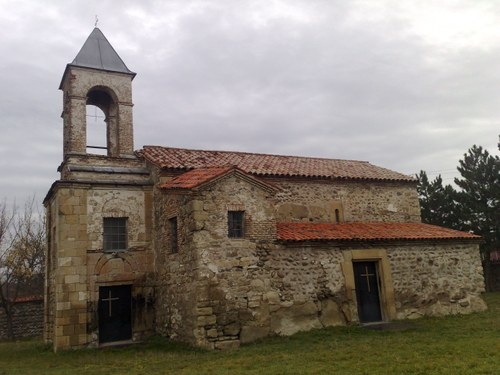 საღოლაშენის ღვთისმშობლის მიძინების ეკლესია